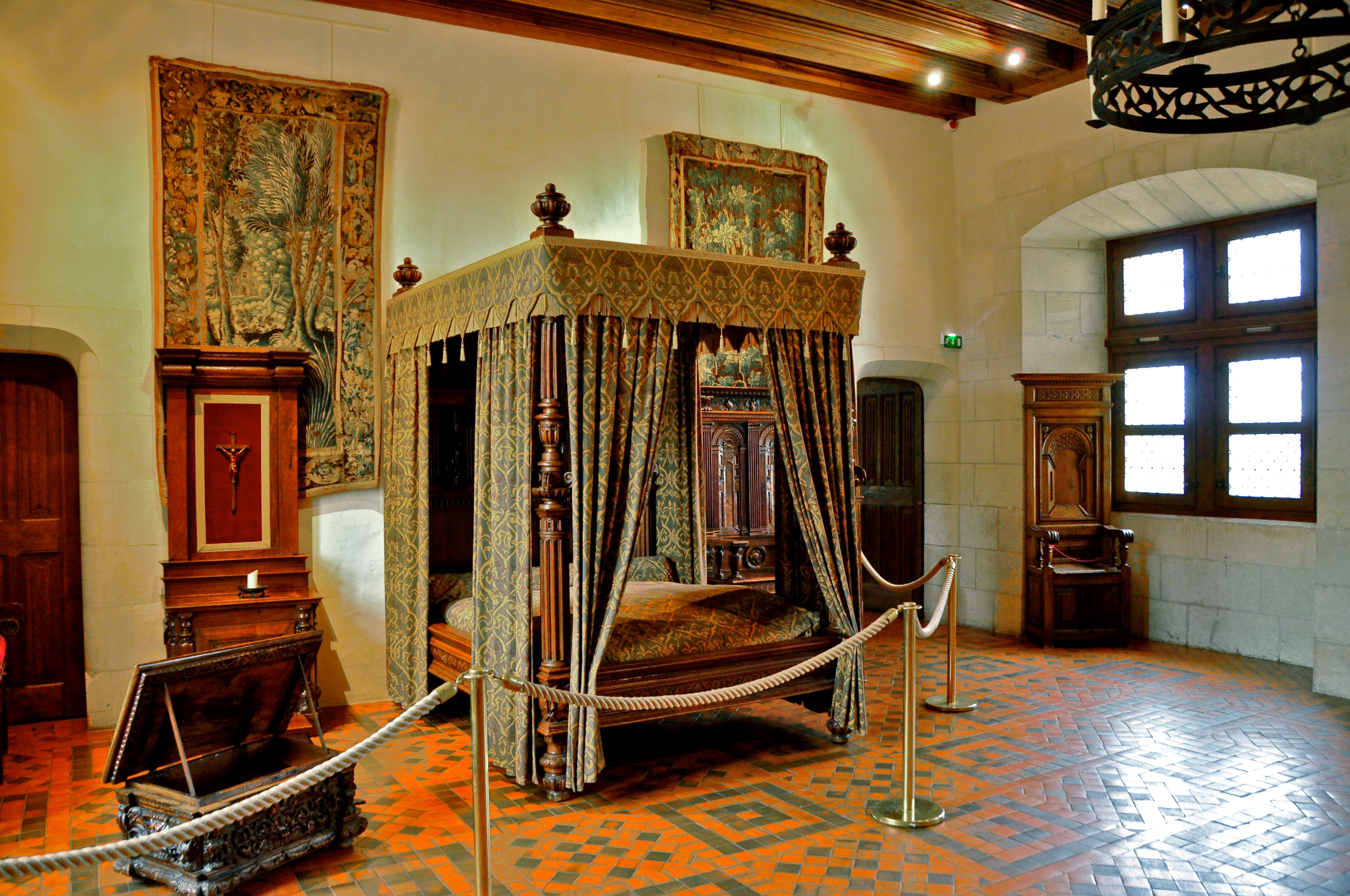 Schlafzimmer Heinrichs II. im Schloss Amboise